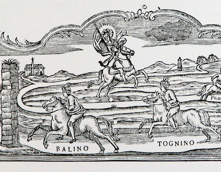 Détail palio asti XVIII siècle